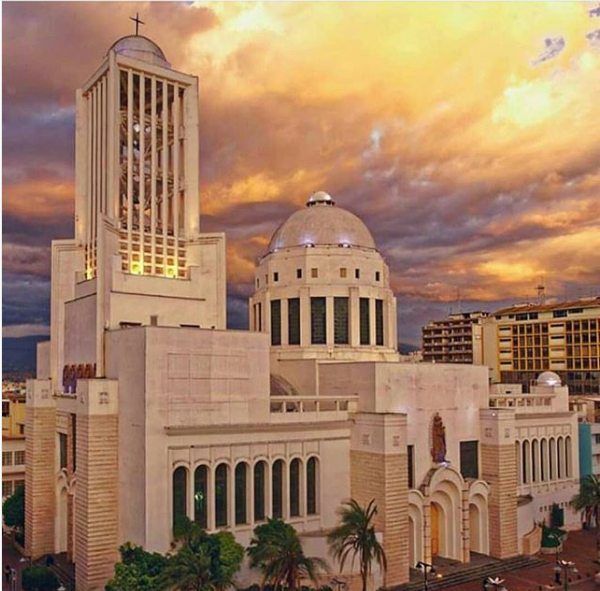 Vista de la Catedral de la ciudad de Ambato